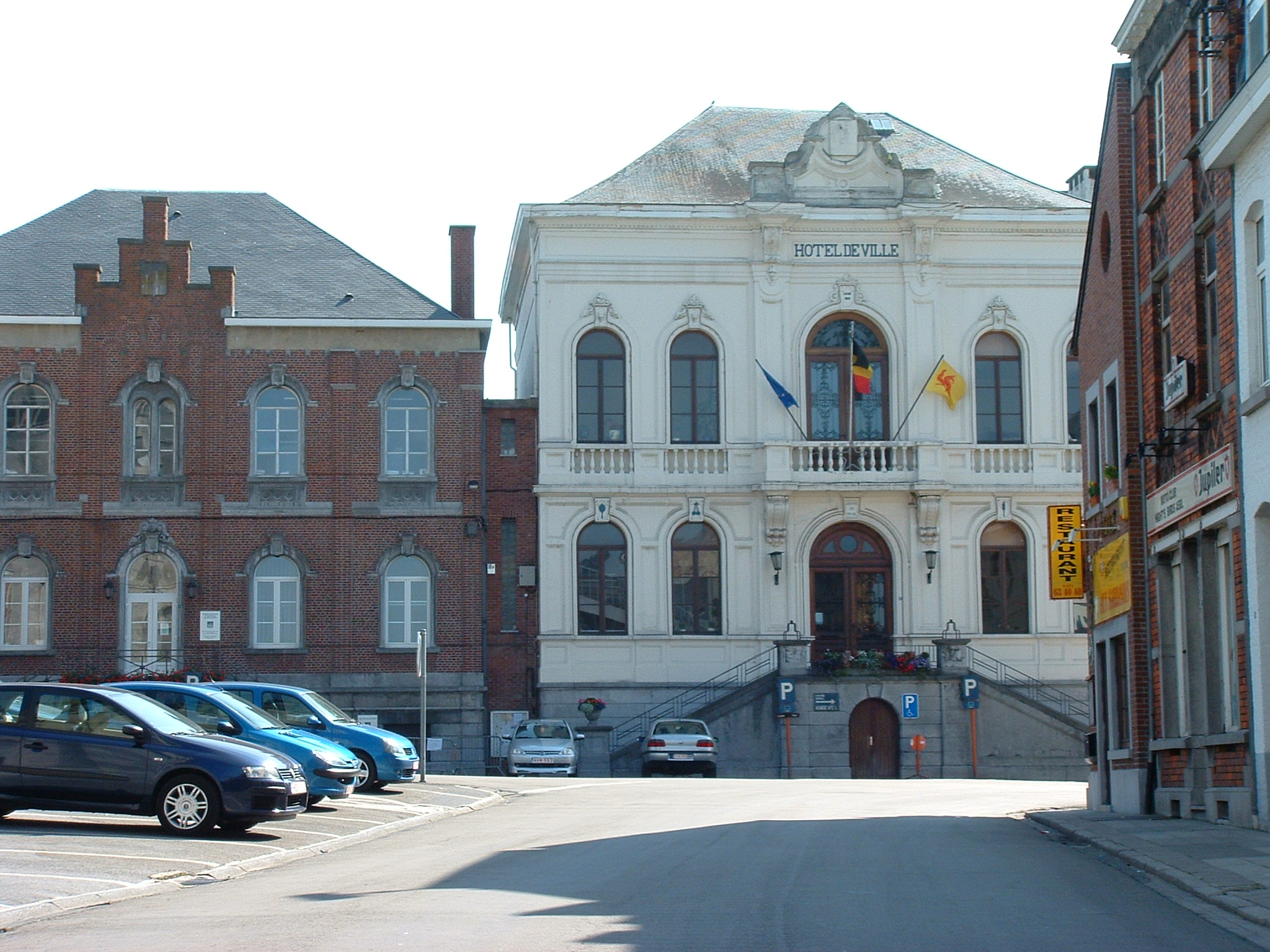 Foto 17/07/2005